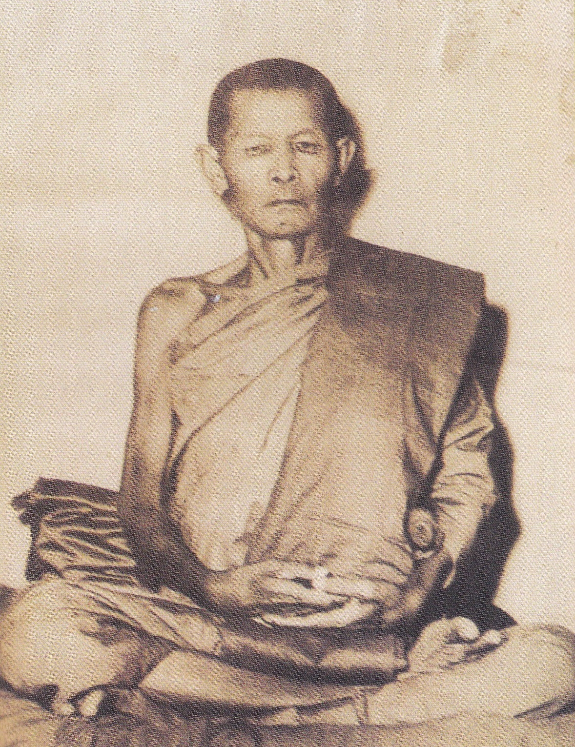 หลวงปู่สิงห์